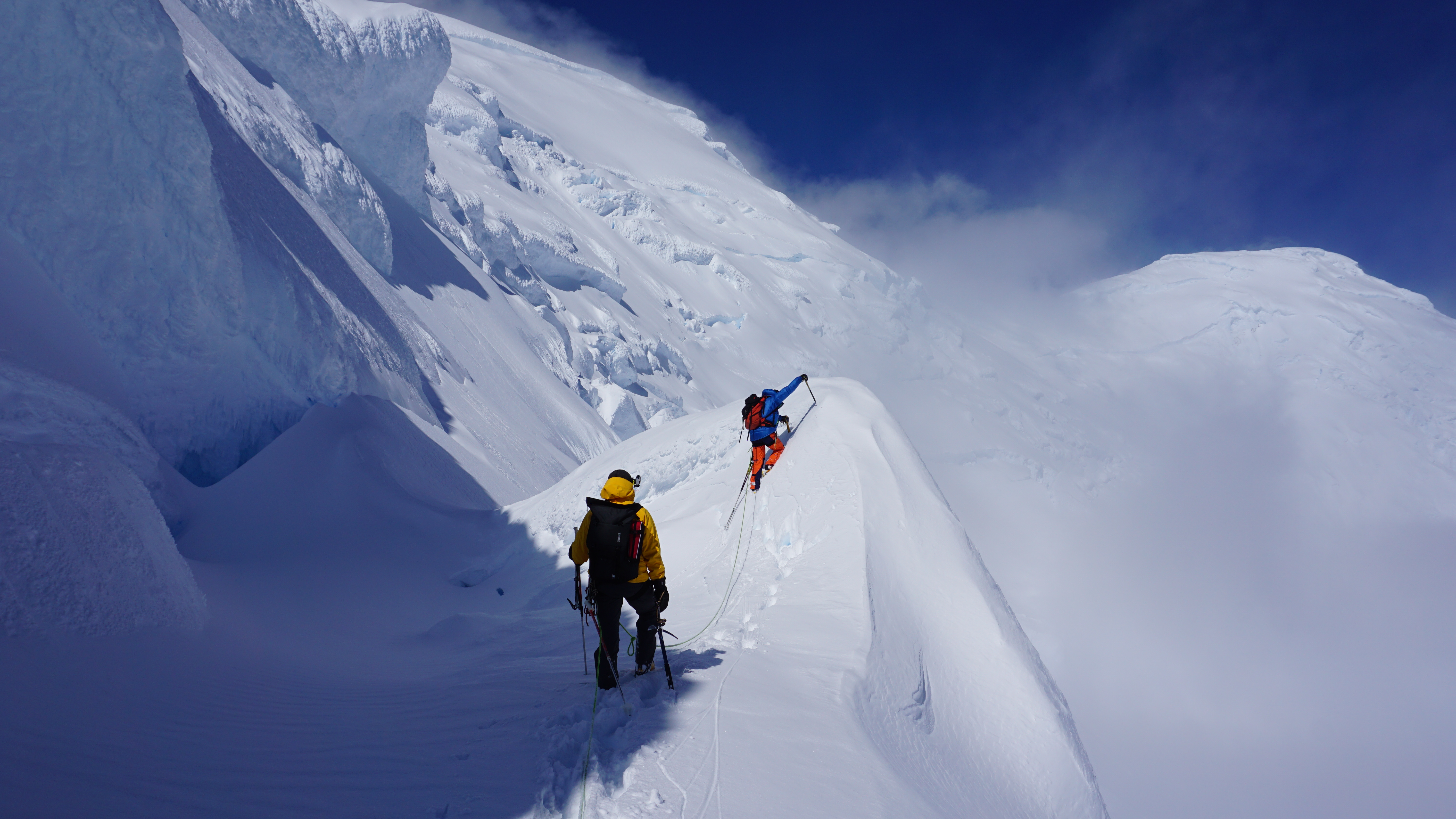 Академия